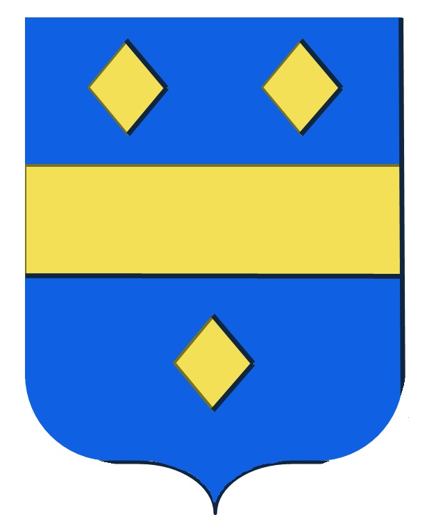 Wapen de Spoelberch